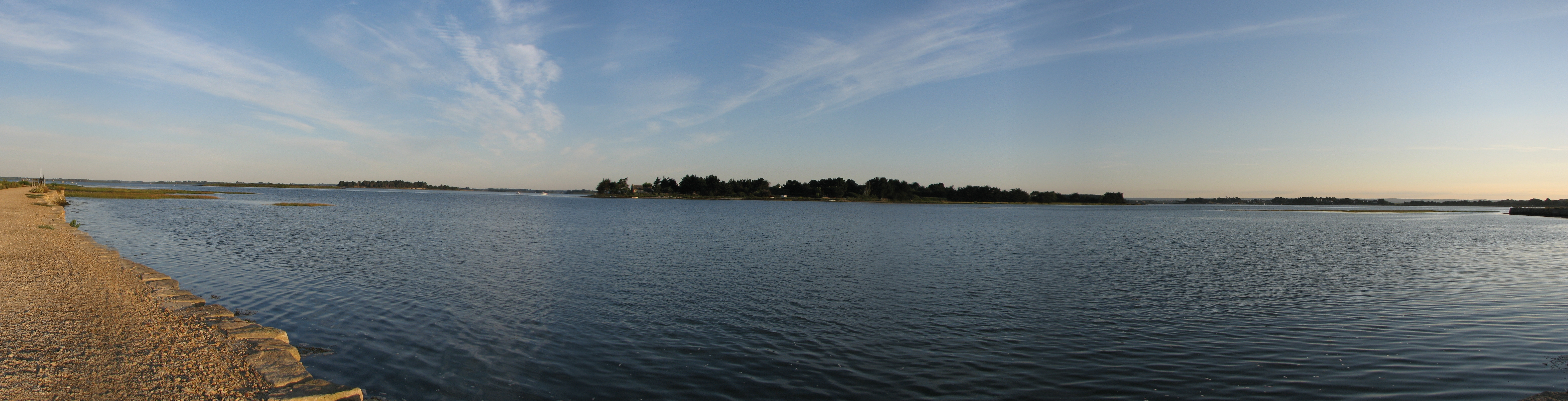 Île Tascon vu du marais salant de Lasné (Saint-Armel - Morbihan, 56).